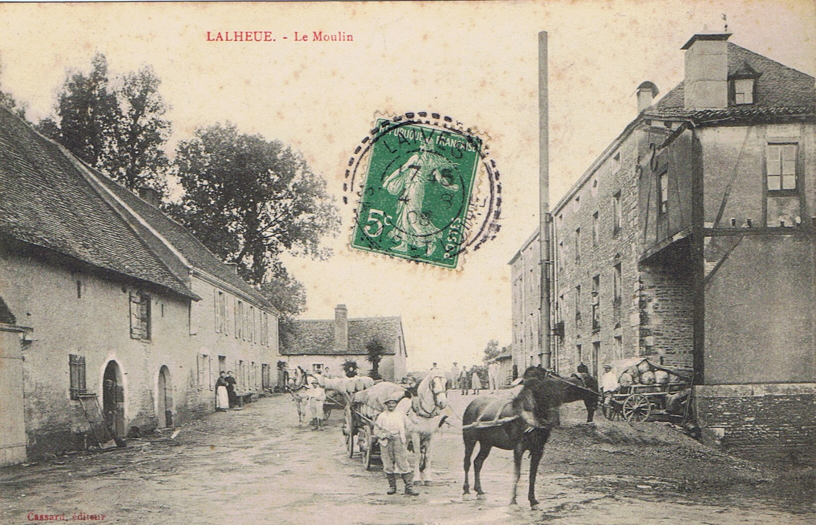 Le moulin de Lalheue, carte postale ancienne datée de 1908. Cassard éditeur